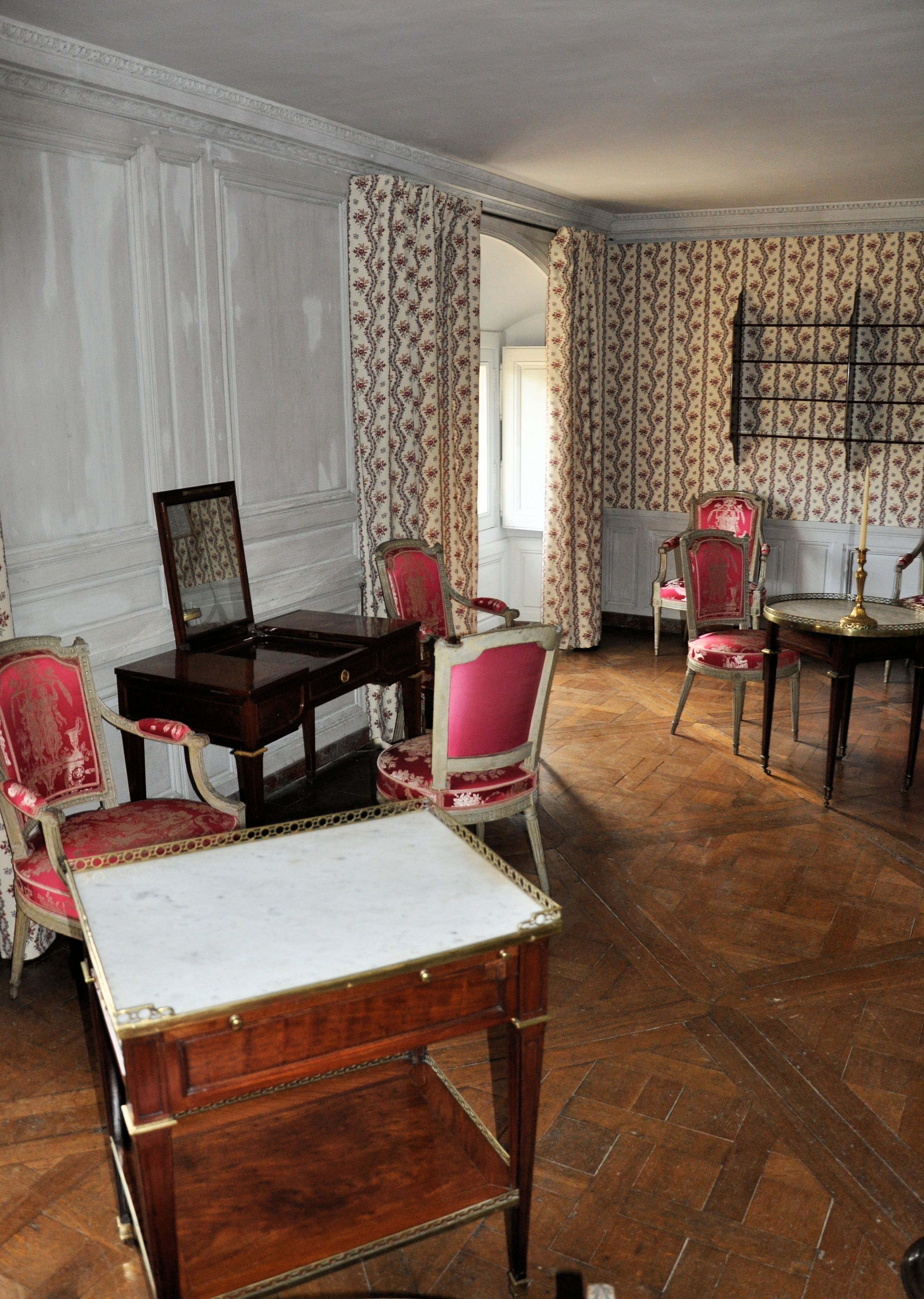 Petit Trianon - Chambre de la dame d'honneur